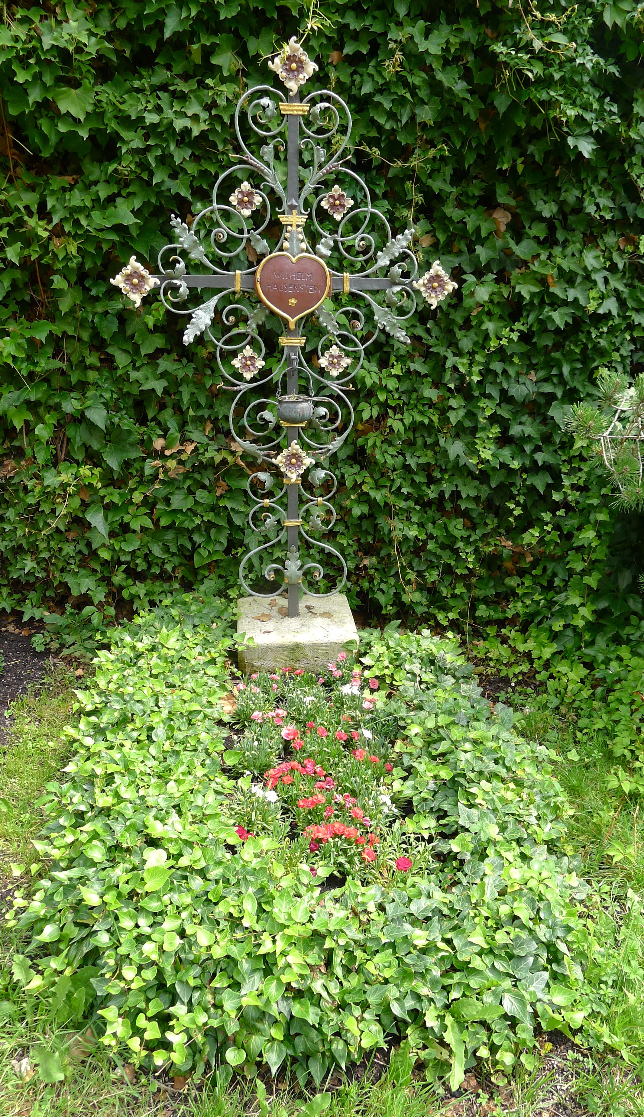 Das Grab Wilhelm Hausensteins befindet sich auf dem Bogenhausener Friedhof